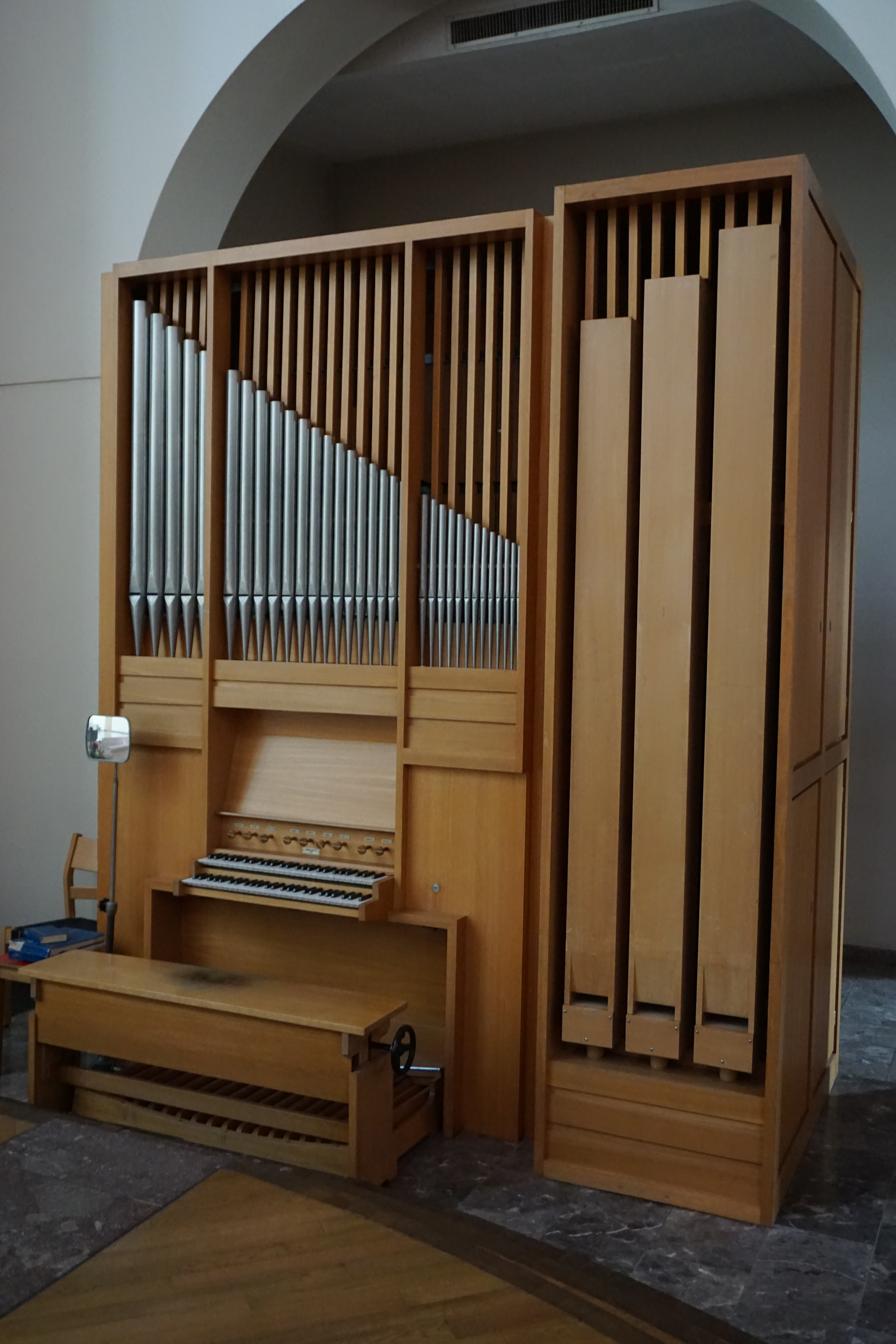 Chororgel der Berner Marienkirche